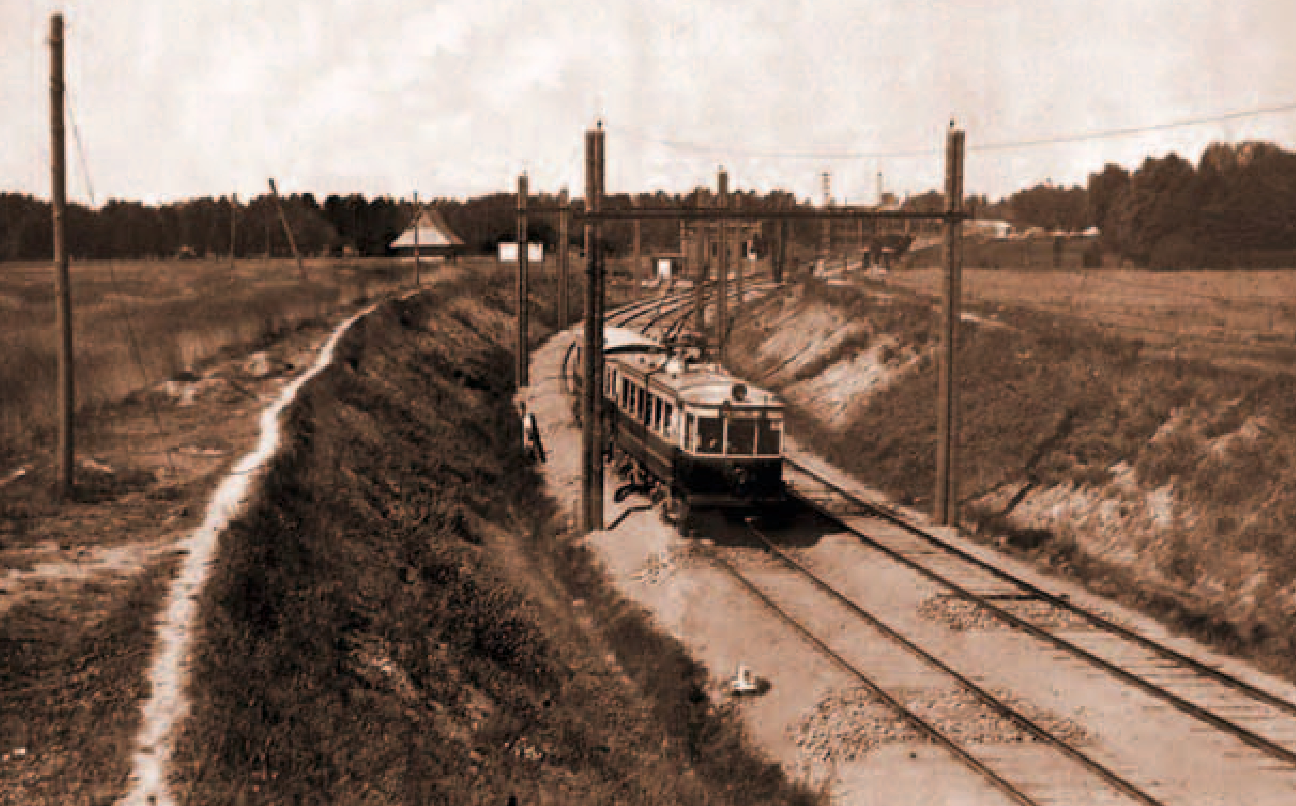 Zdjęcie pociągu EKD na tle stacji w Pruszkowie zrobione z poziomu wiaduktu Alei Armii Krajowej w Pruszkowie.